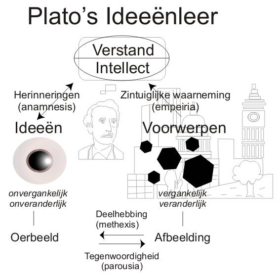 Plato's ideeenleer globaal